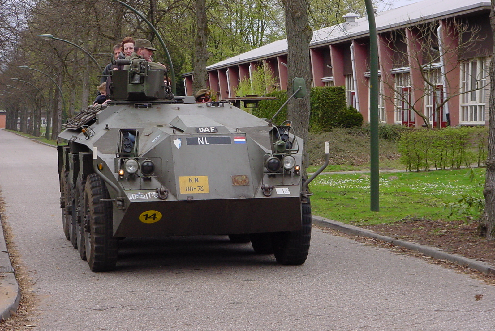 eigen foto, YP-dag Harskamp 2004.